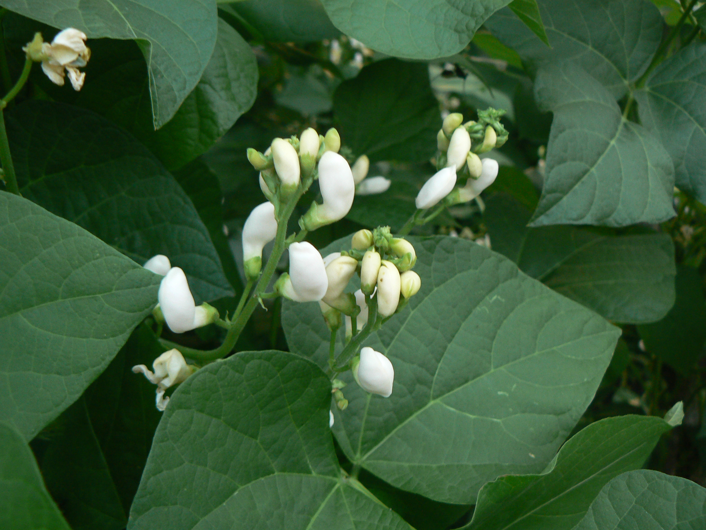 Planta de alubias en flor procedente de Villafranca de la Sierra (ÁVILA; ESPAÑA).